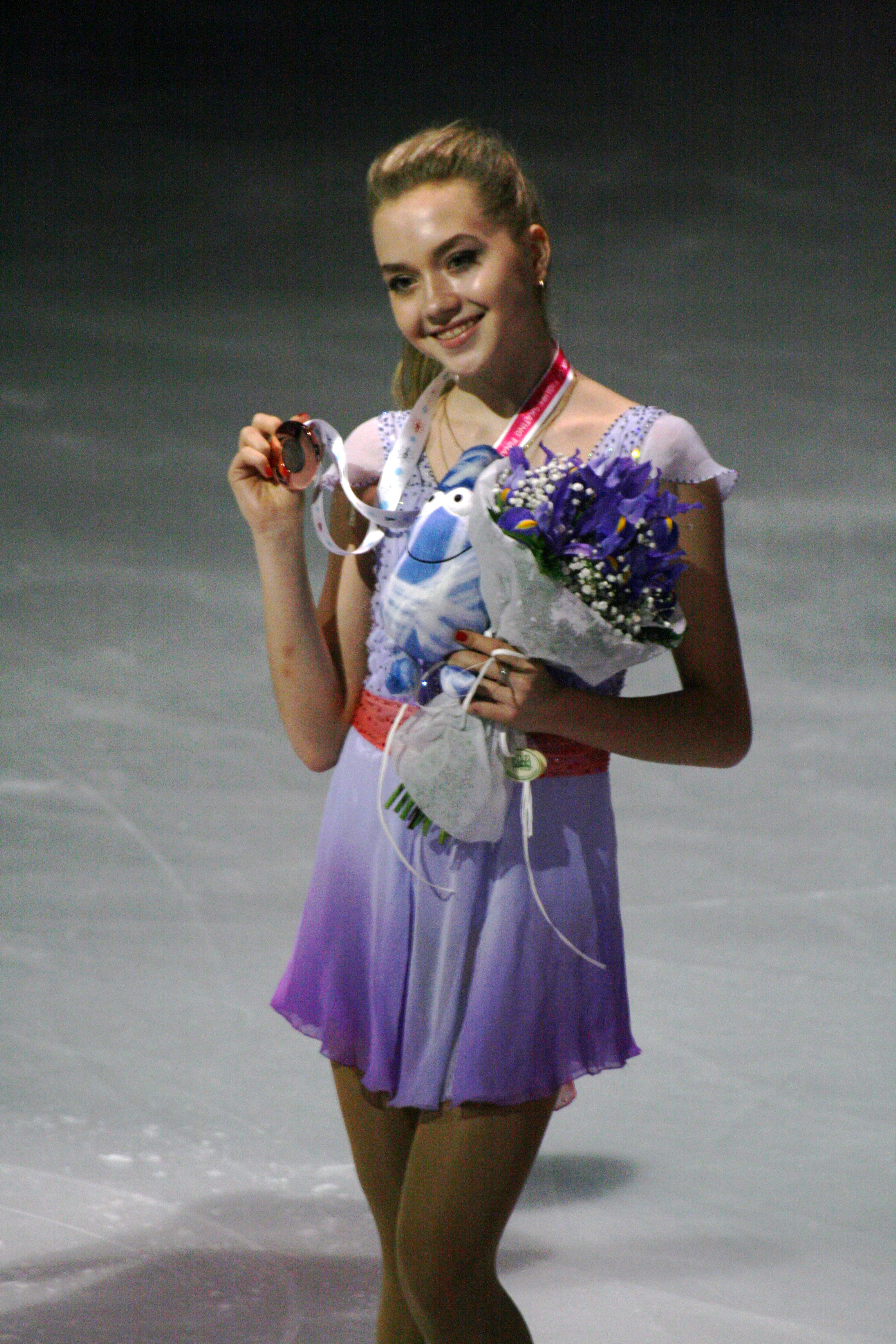 Елена Радионова (Россия) - 3е место на церемонии награждения в финале Гран-при по фигурному катанию 2015-2016.